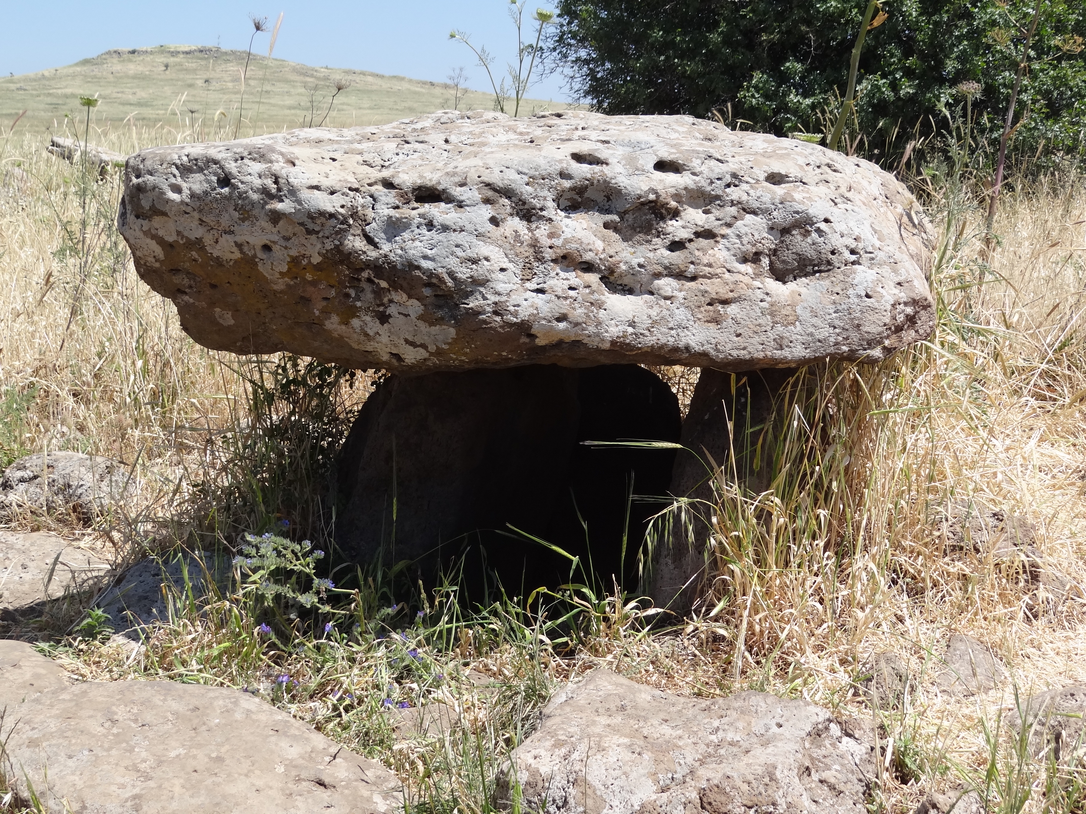 Gamla Nature reserv in Golan Heights גמלא היא שמורת טבע ואתר ארכאולוגי במרכז רמת הגולן, כ-20 קילומטרים דרומית לקצרין. דולמן